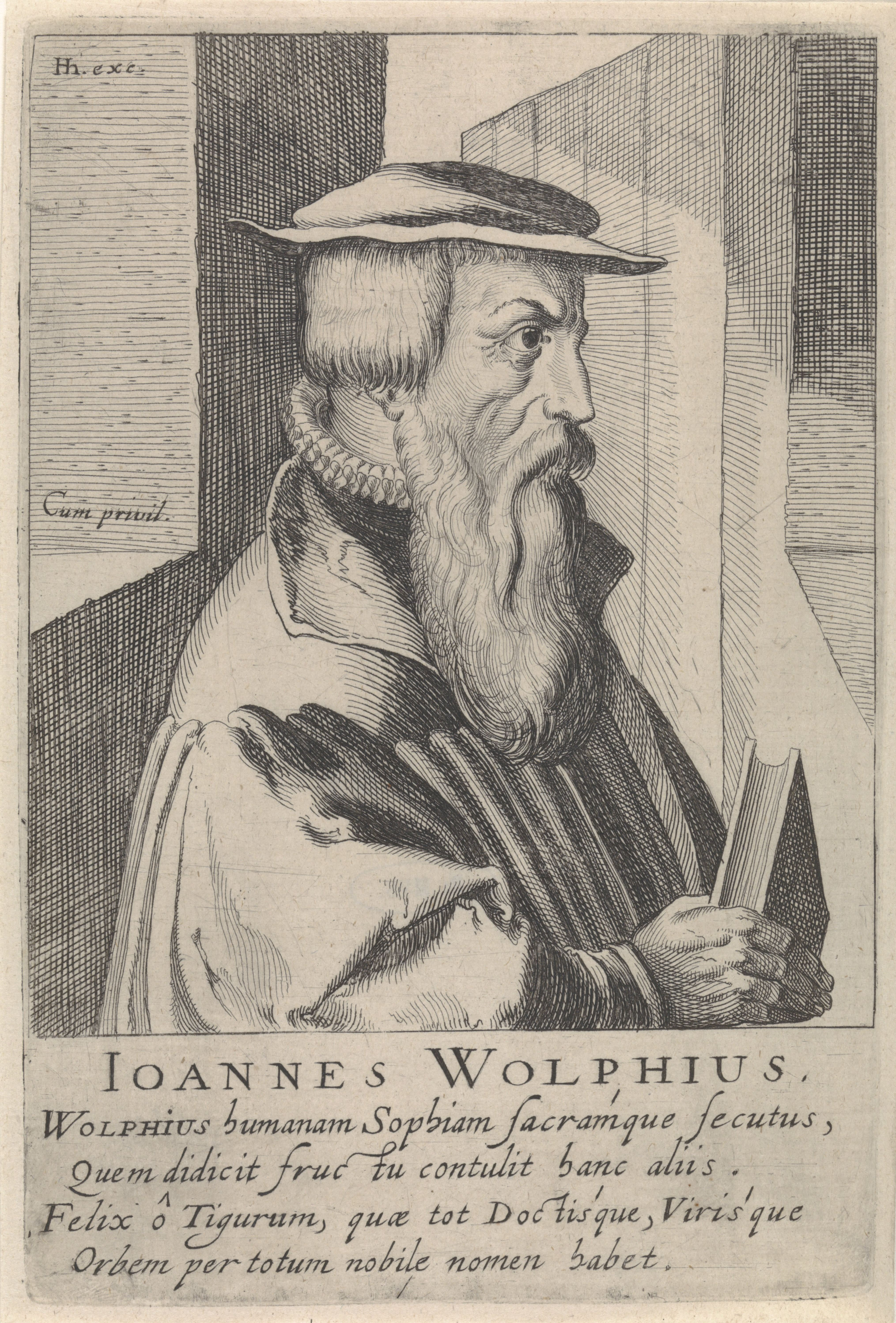 IdentificatieTitel(s): Portret van Johann WolfBeroemde hervormers (serietitel)Effigies praestant. aliquot virorum qui veram in primis religion (serietitel)Objecttype: prent Objectnummer: RP-P-1908-2659Catalogusreferentie: Hollstein Dutch 27New Hollstein Dutch 206Opschriften / Merken: verzamelaarsmerk, verso, gestempeld: Lugt 2228Omschrijving: Buste naar rechts van Johann Wolf. Onder het portret zijn naam en vier regels in het Latijn. Prent uit het later toegevoegde deel 2 (28 prenten) van de serie portretten van beroemde hervormers door Hendrick Hondius uit 1599.VervaardigingVervaardiger: prentmaker: Simon Frisiusuitgever: Hendrick Hondius (I) (vermeld op object)verlener van privilege: onbekend (vermeld op object)Plaats vervaardiging: Den HaagDatering: ca. 1610Fysieke kenmerken: etsMateriaal: papier Techniek: etsenAfmetingen: plaatrand: h 168 mm × b 116 mmOnderwerpWie: Johannes WolfVerwerving en rechtenVerwerving: aankoop 1905Copyright: Publiek domein